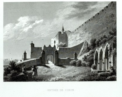 La citadelle de Coron. Abel Blouet, Expédition scientifique de Morée, 1831.